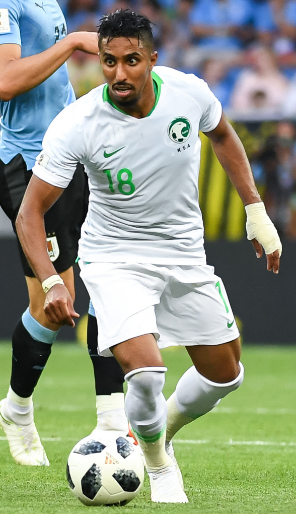 Гол Суареса на «Ростов Арене» вывел Уругвай в плей-офф чемпионата мира